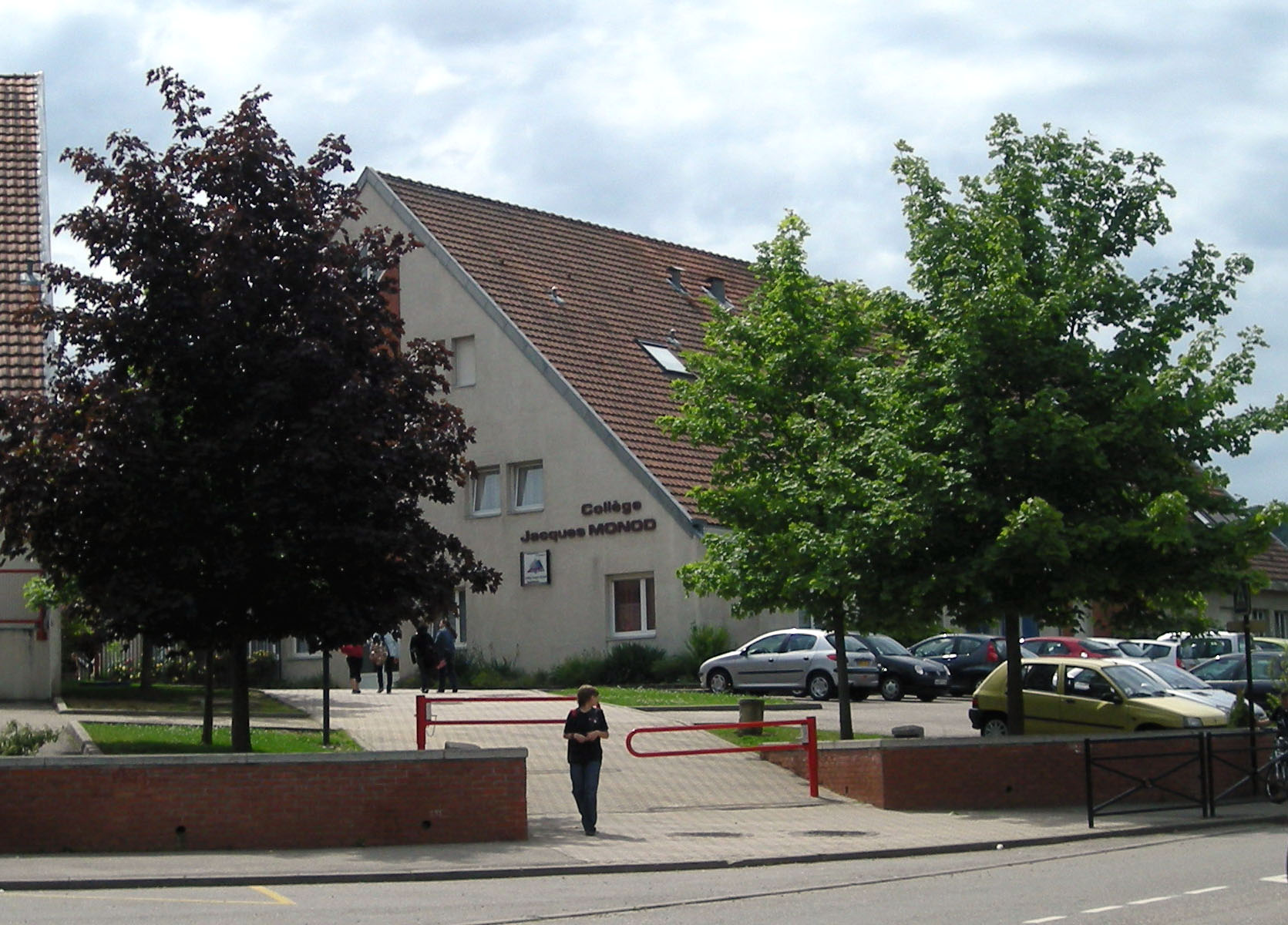 Collège Jacques Monod à Ludres (Meurthe-et-Moselle)